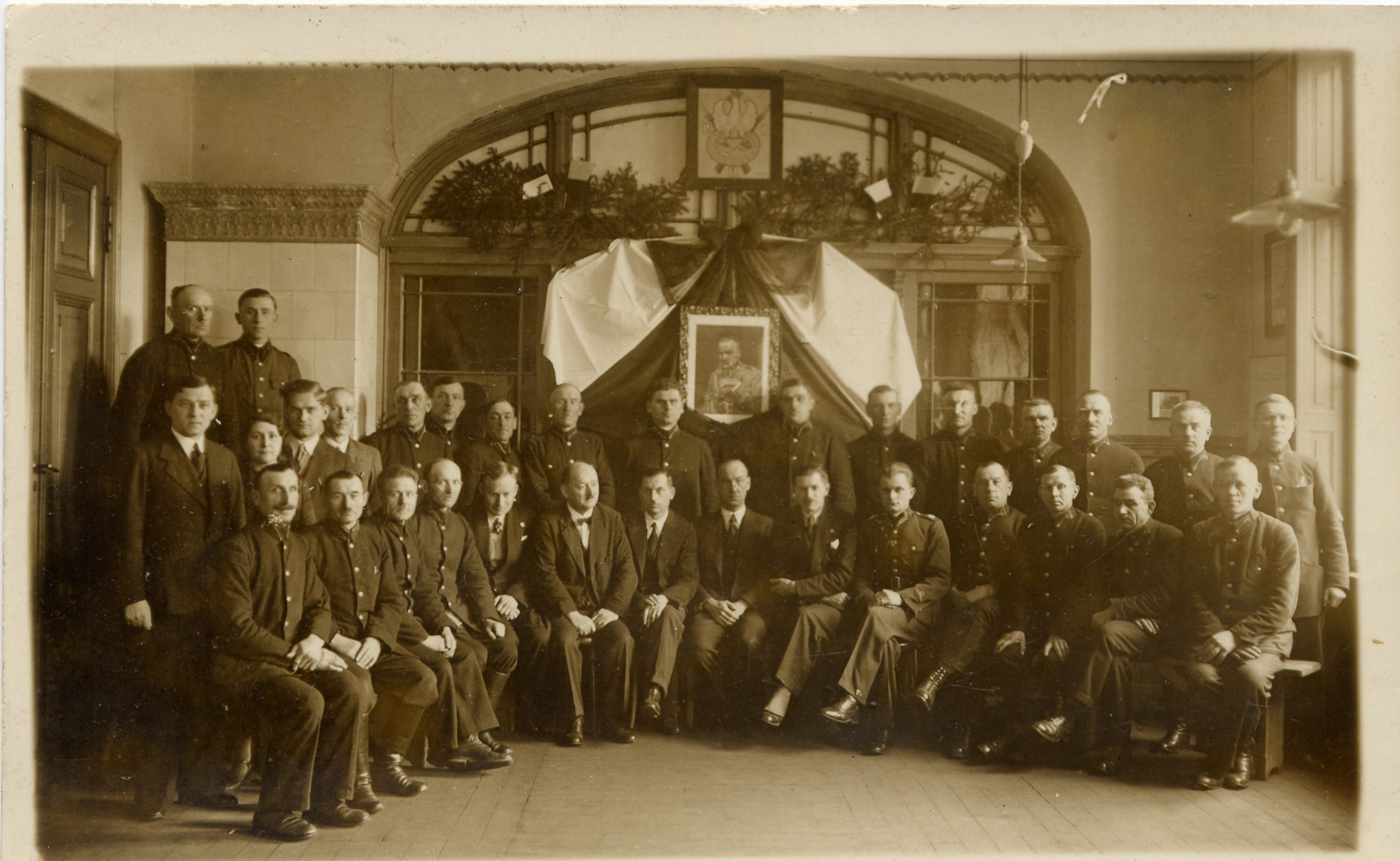 Spotkanie szachistów klubu Giermek Zduny 1932, fotokopia z mojego albumu rodzinnego